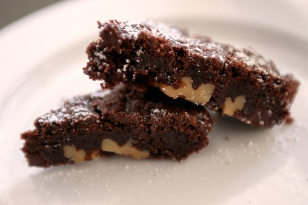 Taken 25 August 2010.